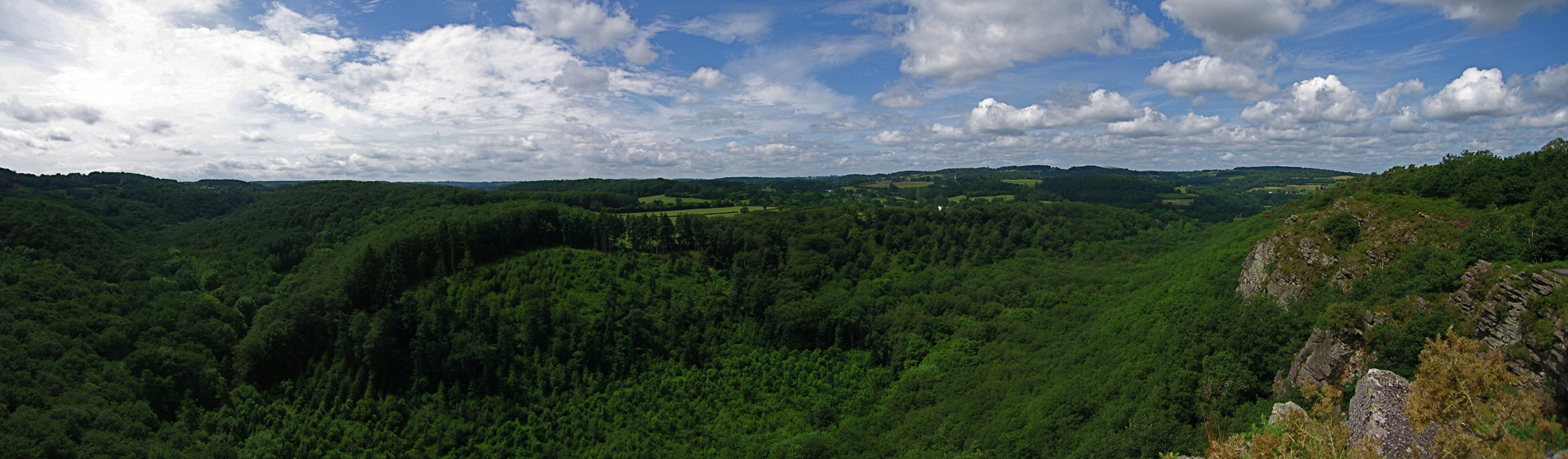 Panorama pris depuis la Roche d'Oëtre